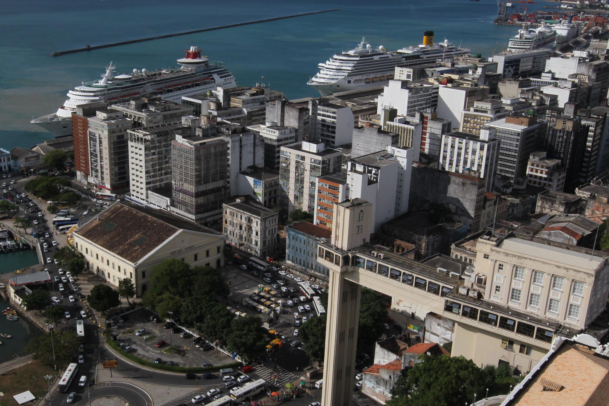 Cruzeiros Marítimos aportam em Salvador Foto Manu Dias/AGECOM